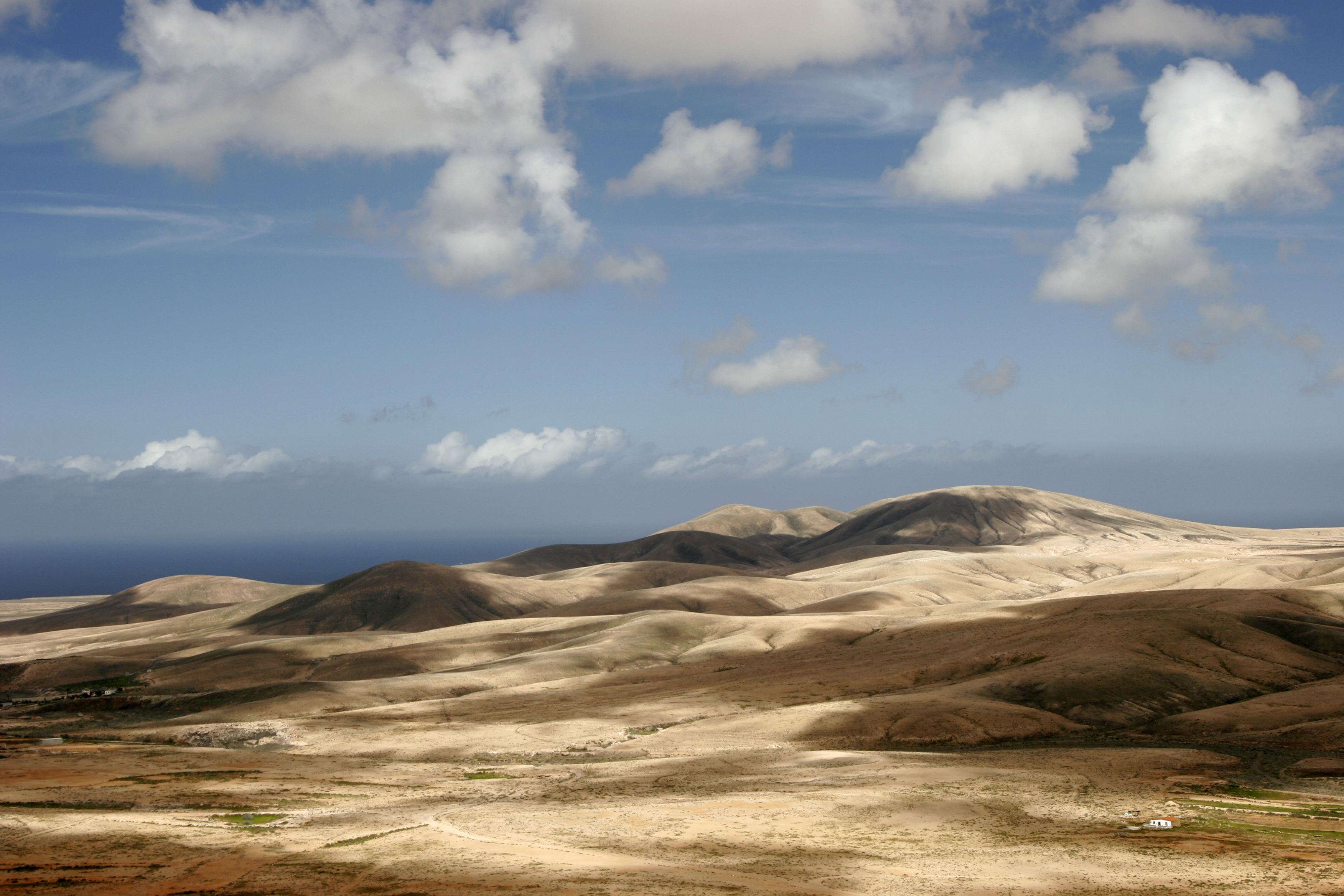 Parque Rural de Betancuria This is a photography of a Site of Community Importance in Spain with the ID: ES7010062. Natura2000 entry, EEA entry